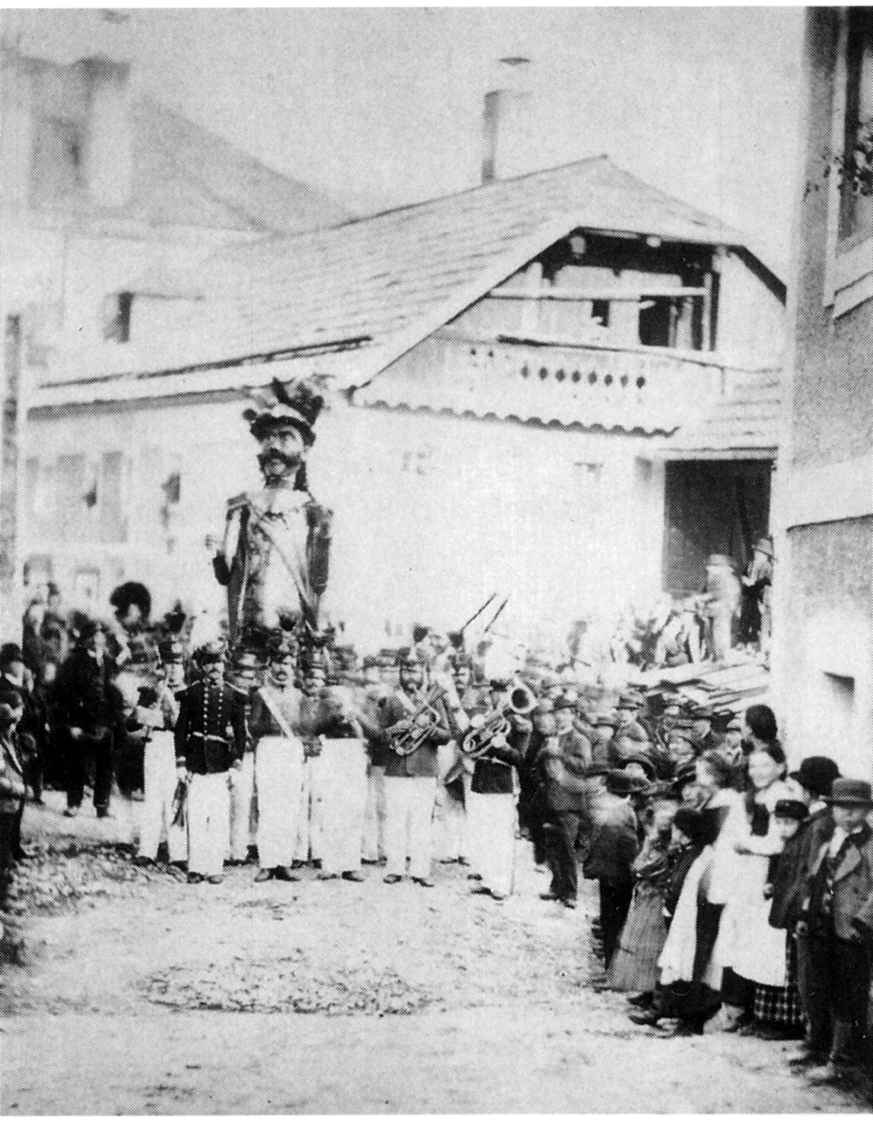 Älteste Fotographie eines Samsons - des Samsons aus St. Michael im Lungau